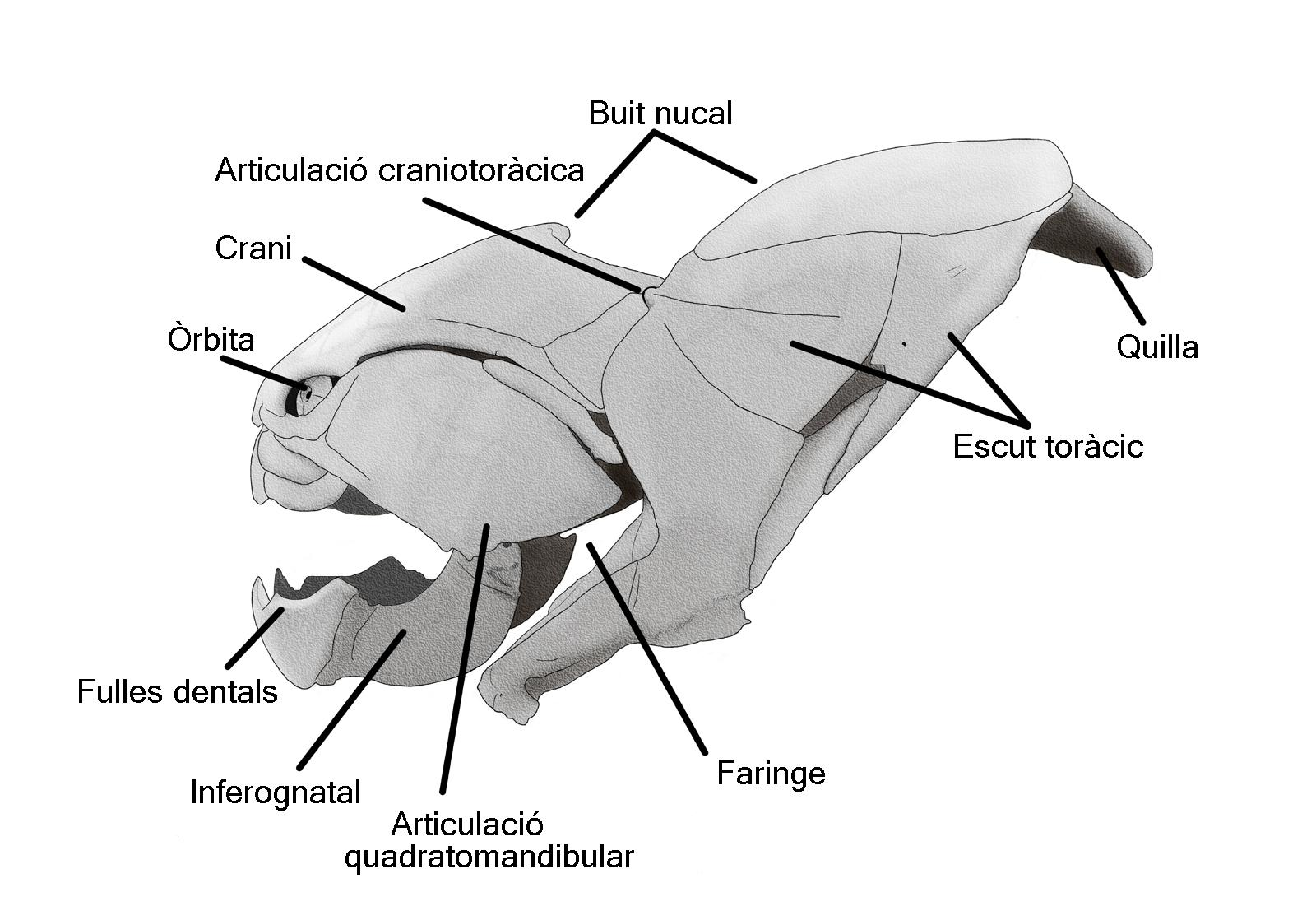 Imatge del crani del placoderm del Devonià Dunkleosteus.